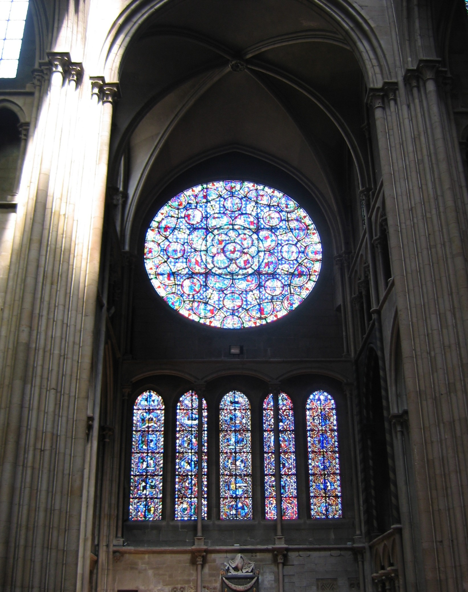 Dijon, Bourgogne, France. Rosace du transept nord.